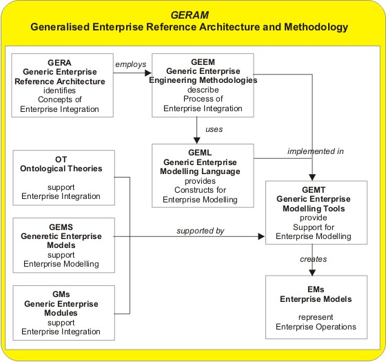 GERAM Framework